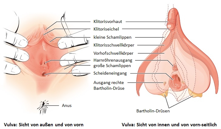 menschliche Vulva